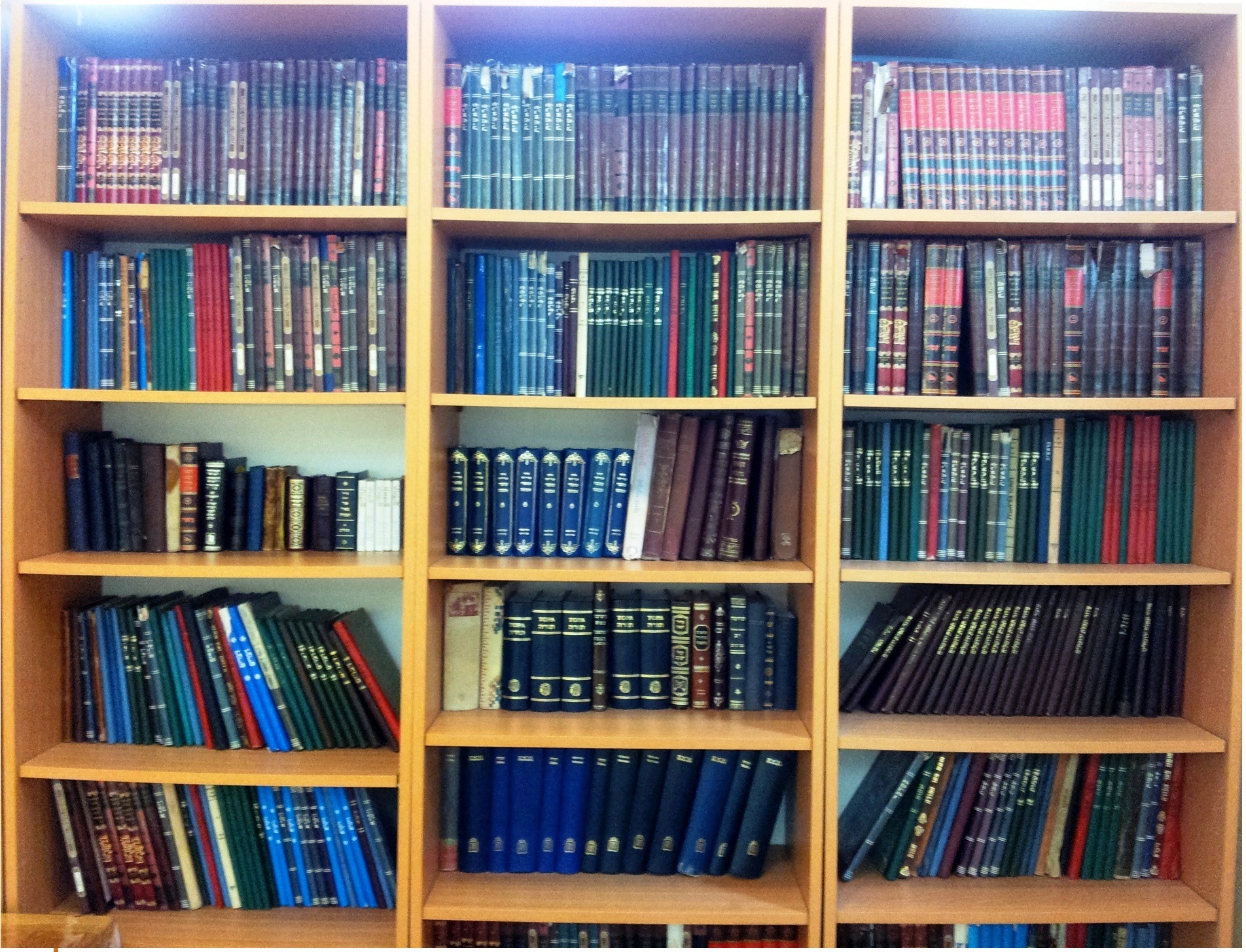 ארון ספרים בבית הכנסת הגדול בעפולה